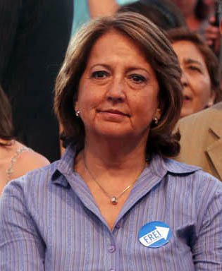 Soledad Alvear durante el cierre de campaña de Eduardo Frei Ruiz-Tagle.